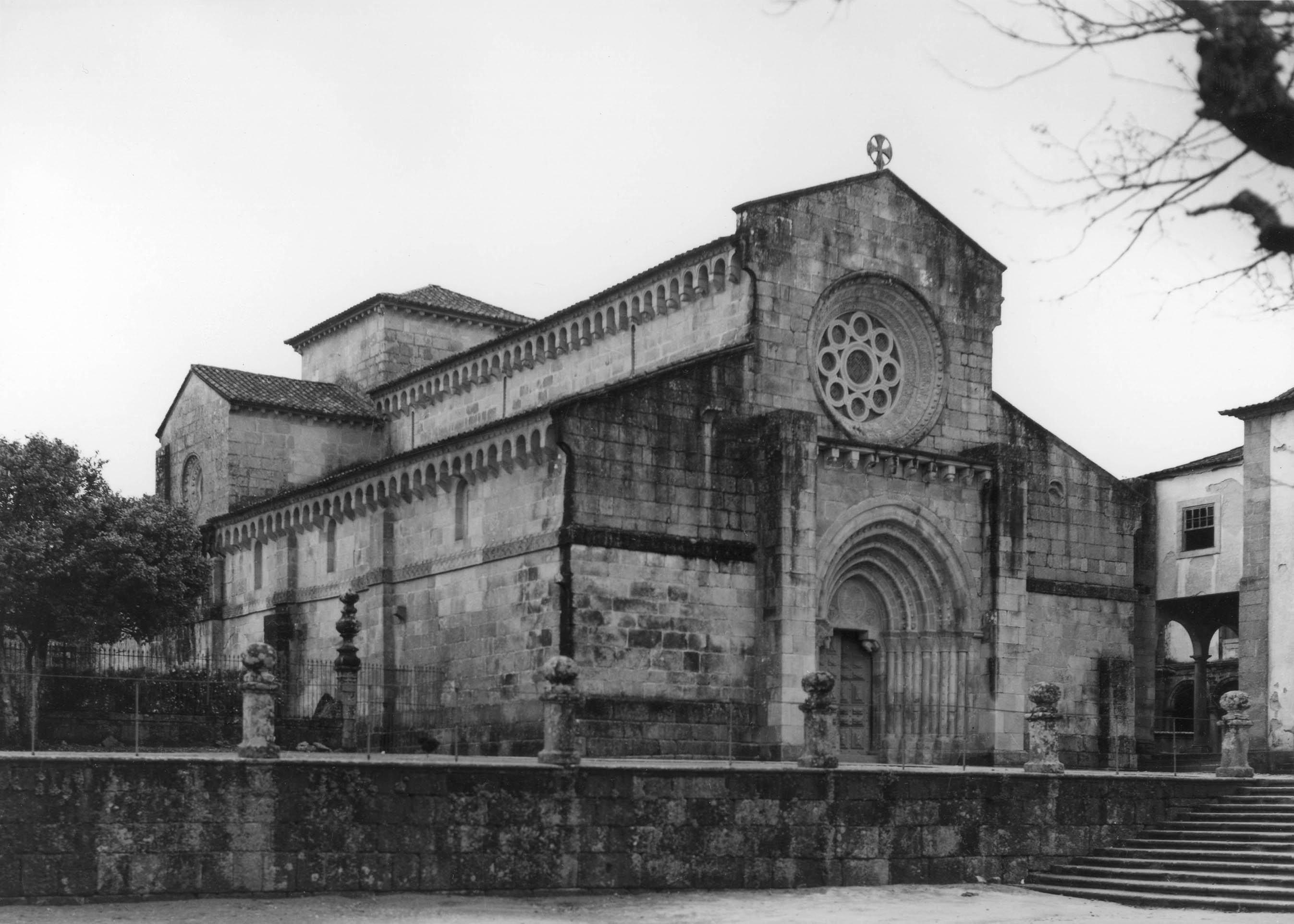 Vista geral. Fotógrafo: Mário Novais, 1899-1967. Orientador científico: Mário Tavares Chicó, 1905-1966. Data aproximada de produção da fotografia original: 1954. [CFT015.286.ic]